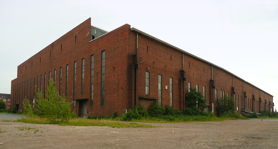 Hanomag Hanover alte U-Boot-Halle